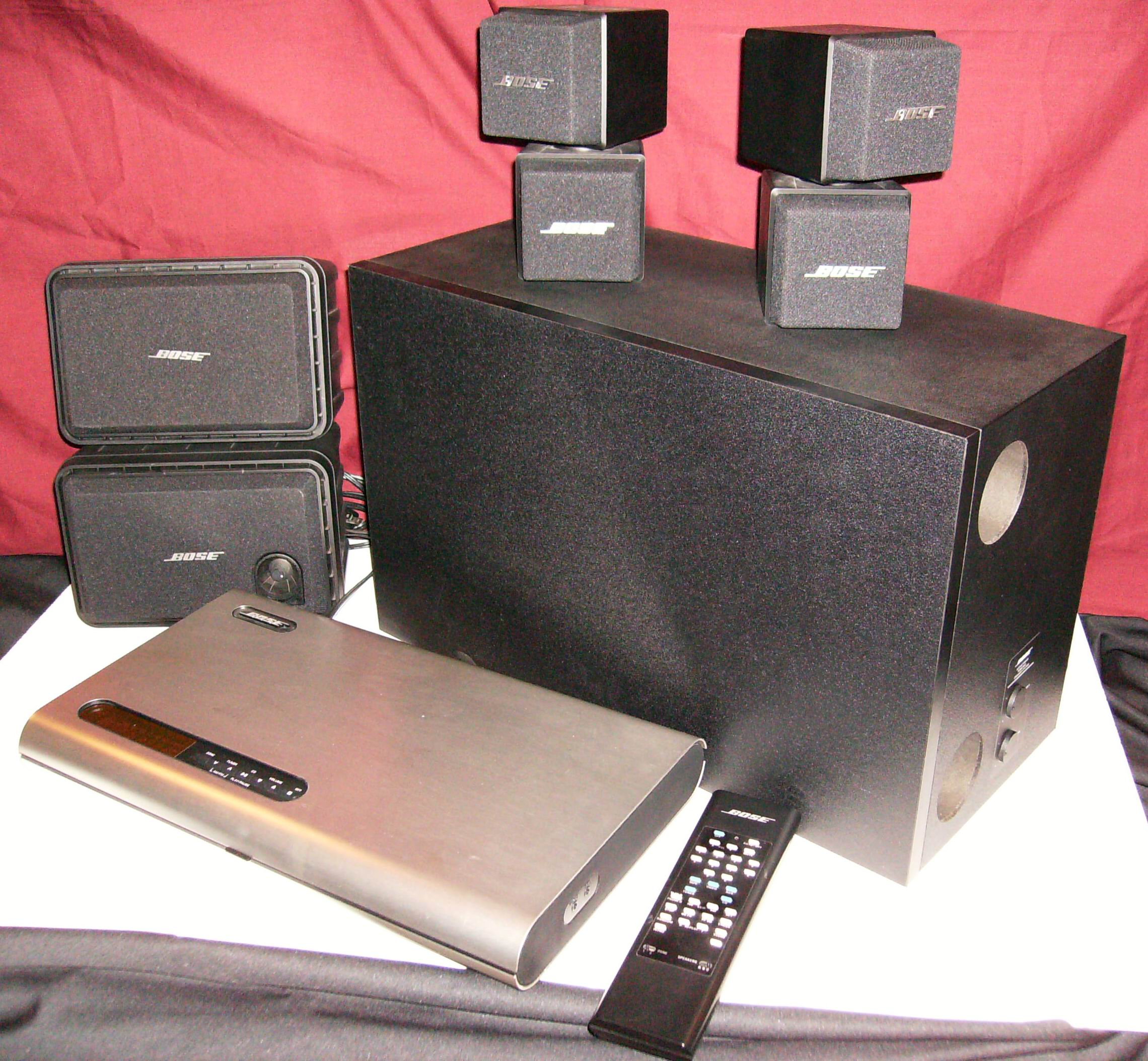 Bose Lifestyle 11